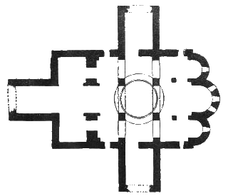 План Северного Зеленчукского храма.